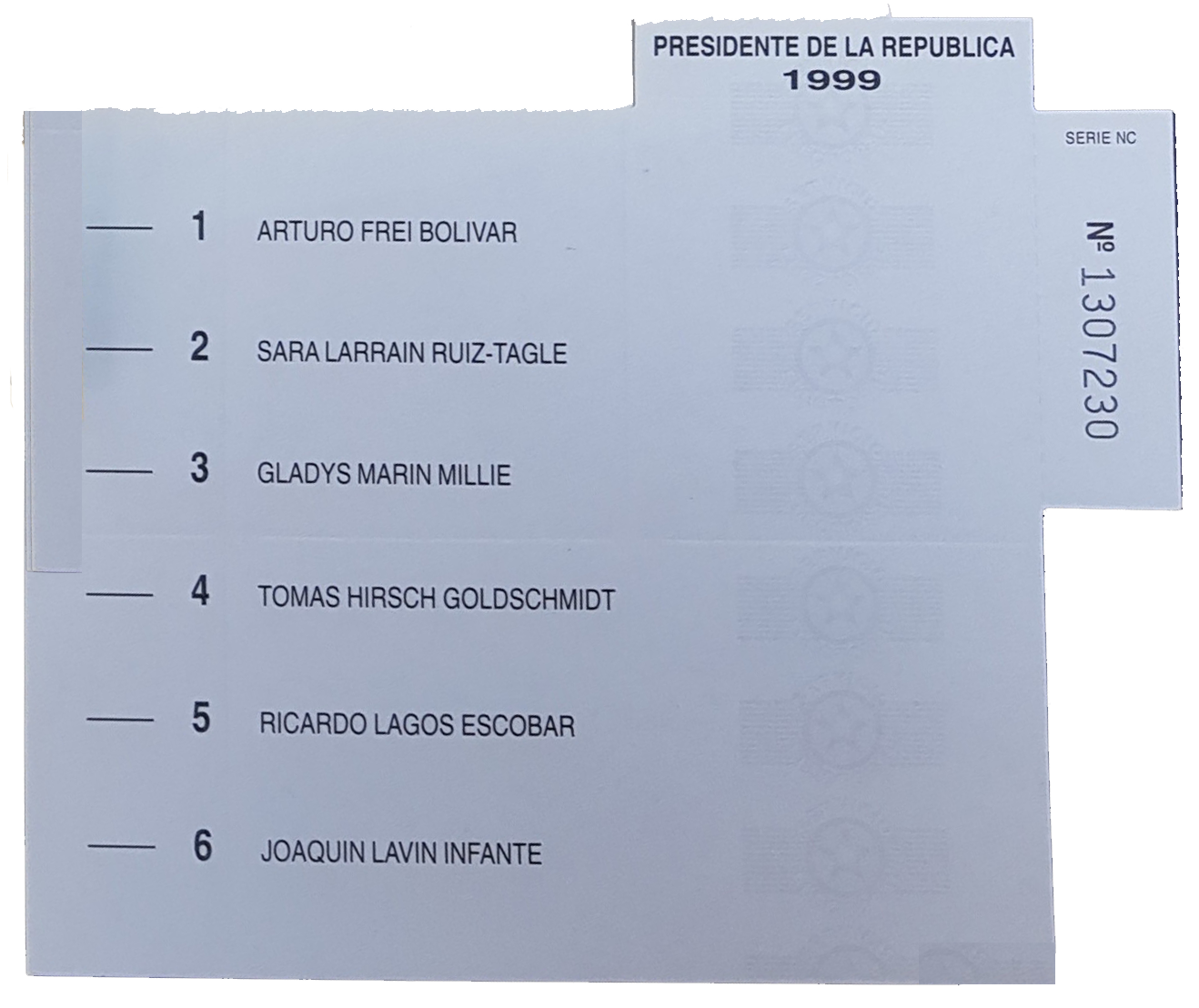 Papeleta de votación usada en la primera vuelta de las elecciones presidenciales de Chile de 1999.